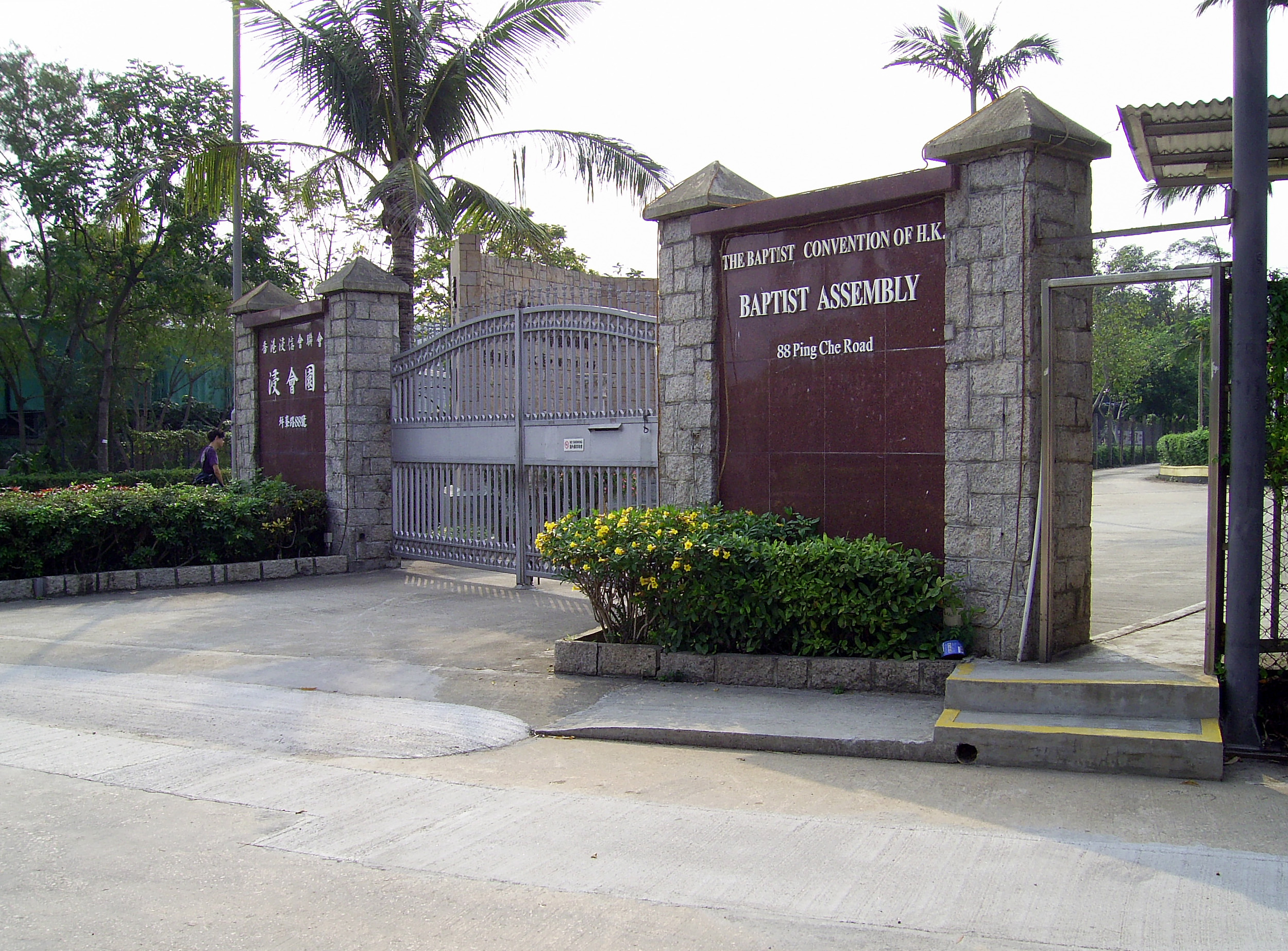 中文（香港）: 香港浸會園